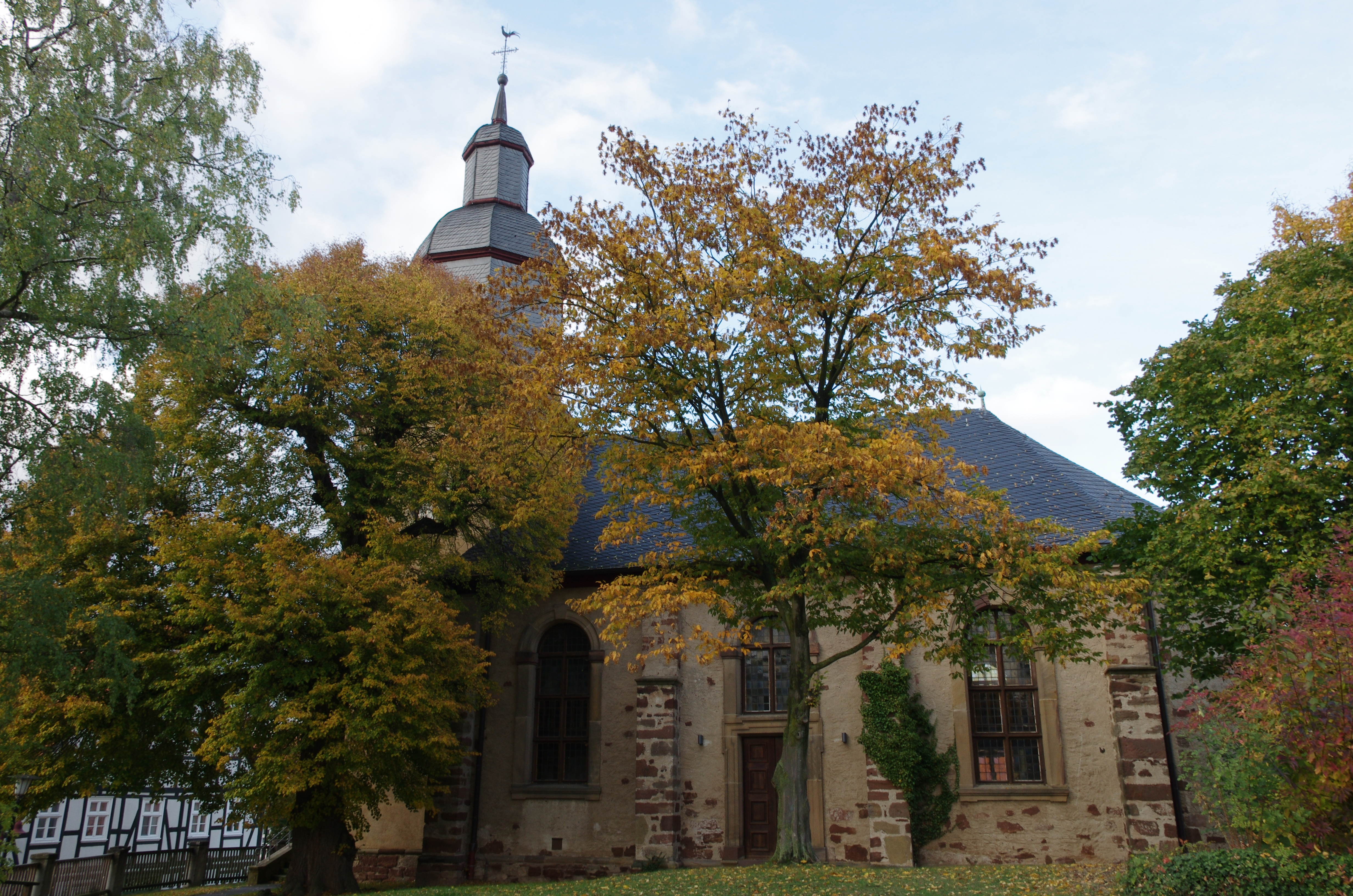 Bad Wildungen Ortsteil Altwildungen in Hessen. Die Kirche in Altwildungen.